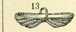 Vandangerot (Bourgogne)